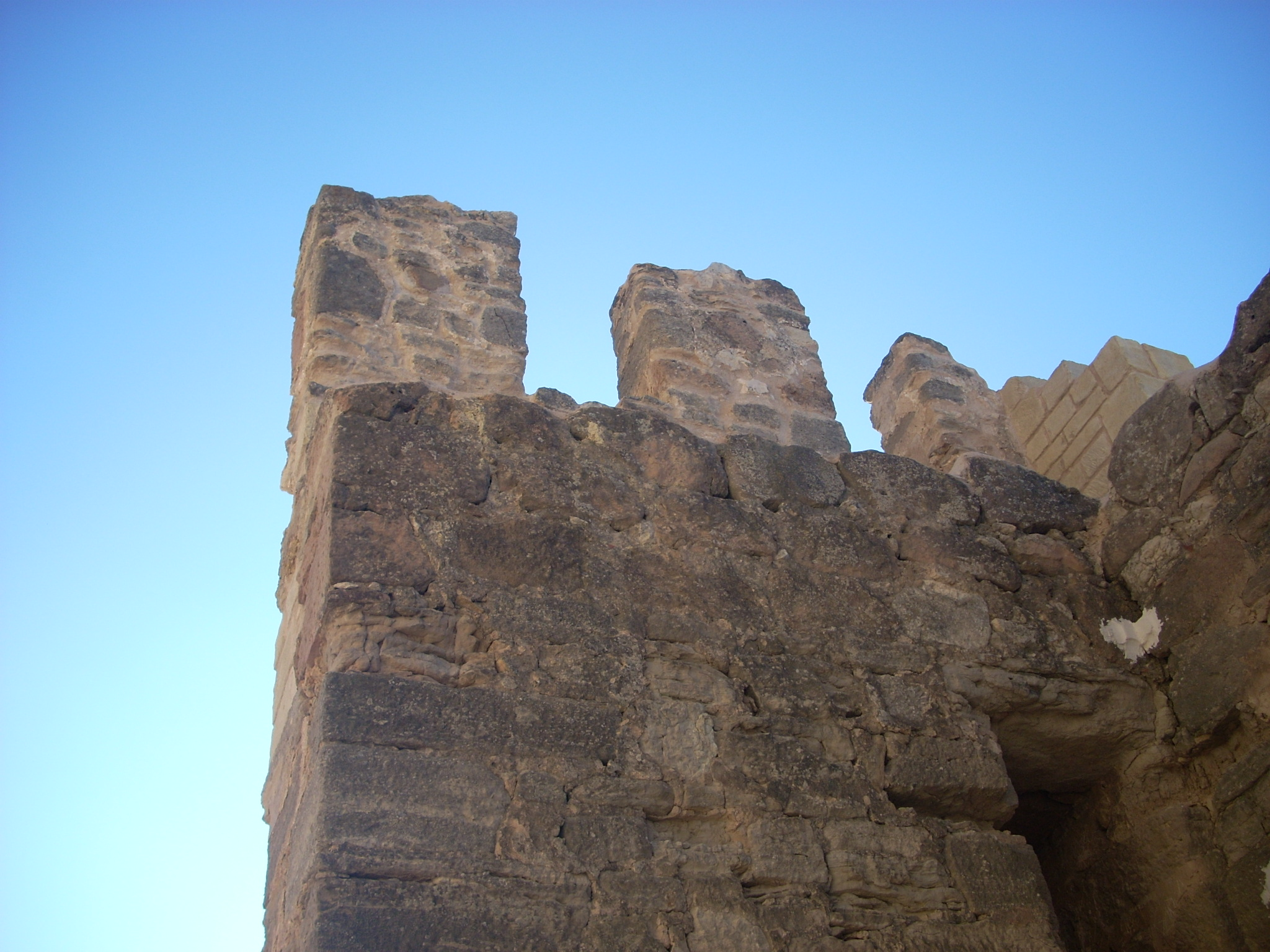 Almenas de la torre del castillo de Quel.